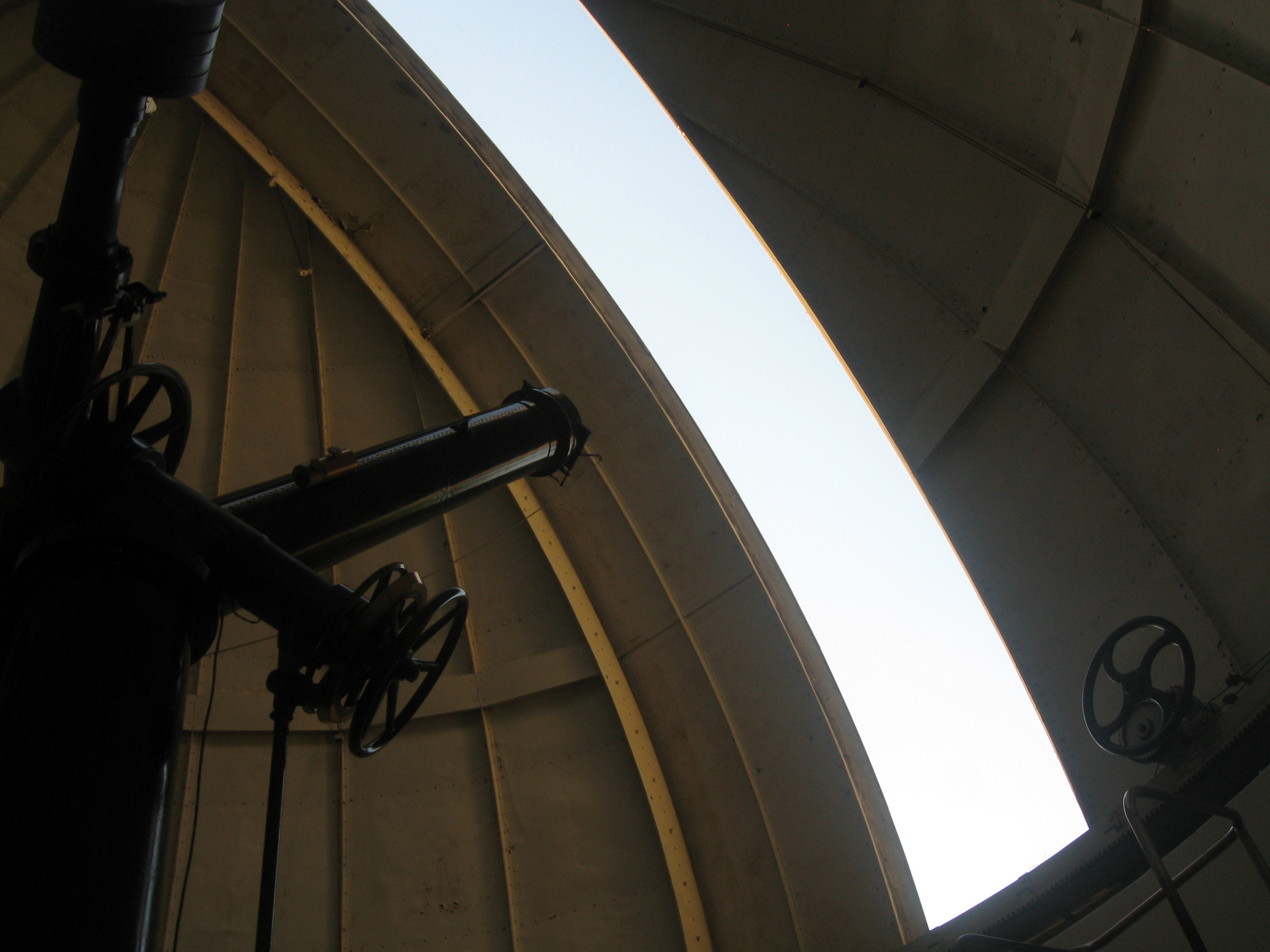 Antiguo telescopio refractor, de origen alemán, instalado en el Observatprio Astronómico Nacional, que queda en Cerro Calán, comuna de Las Condes.